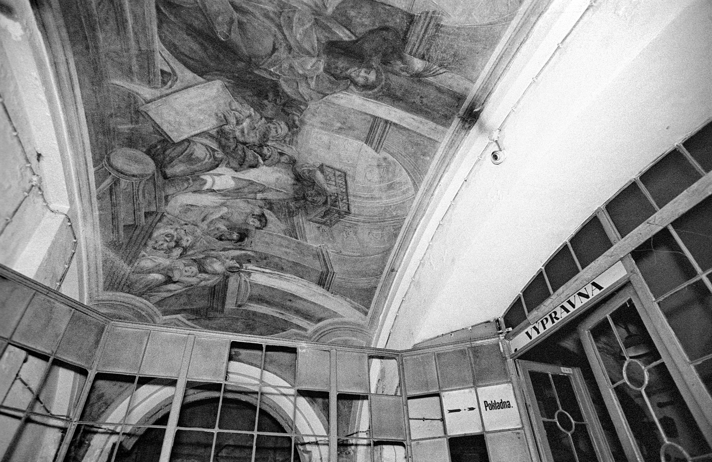 2.nadzemní podlaží - obchodní přepážky pod freskou "Kristus vyhání kupčíky z chrámu"